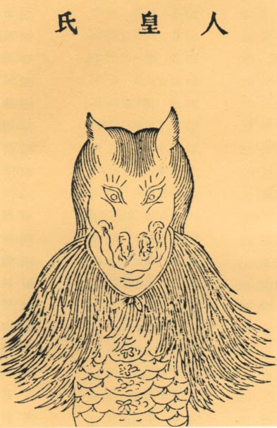 神话传说中的三皇之一。